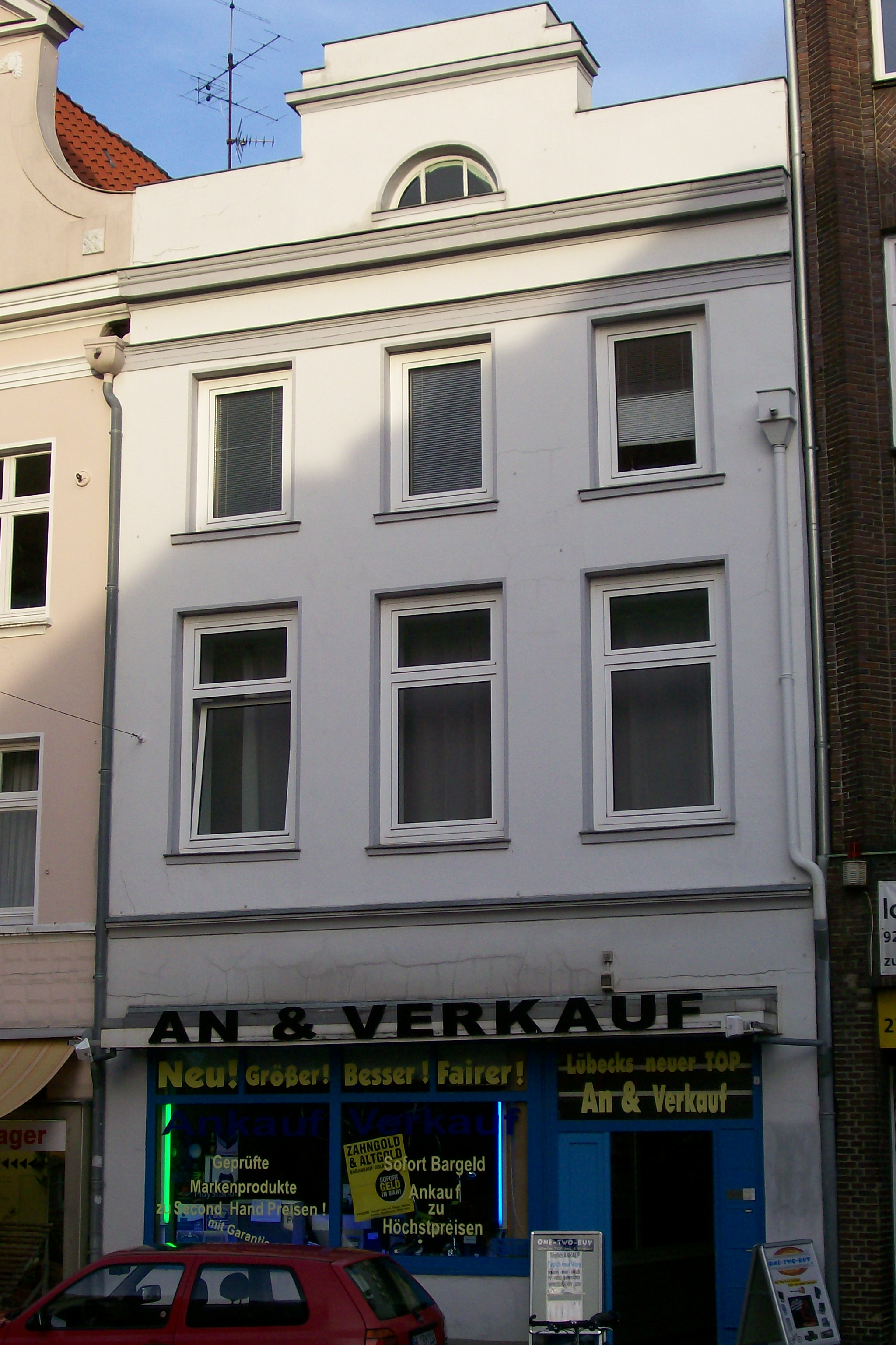 Große Burgstraße 25 in Lübeck, in der Clara Roquette 1871 die Roquettesche Höhere Töchterschule gründete, aus der das Roquettesche private Lehrerinnenseminar hervorging.